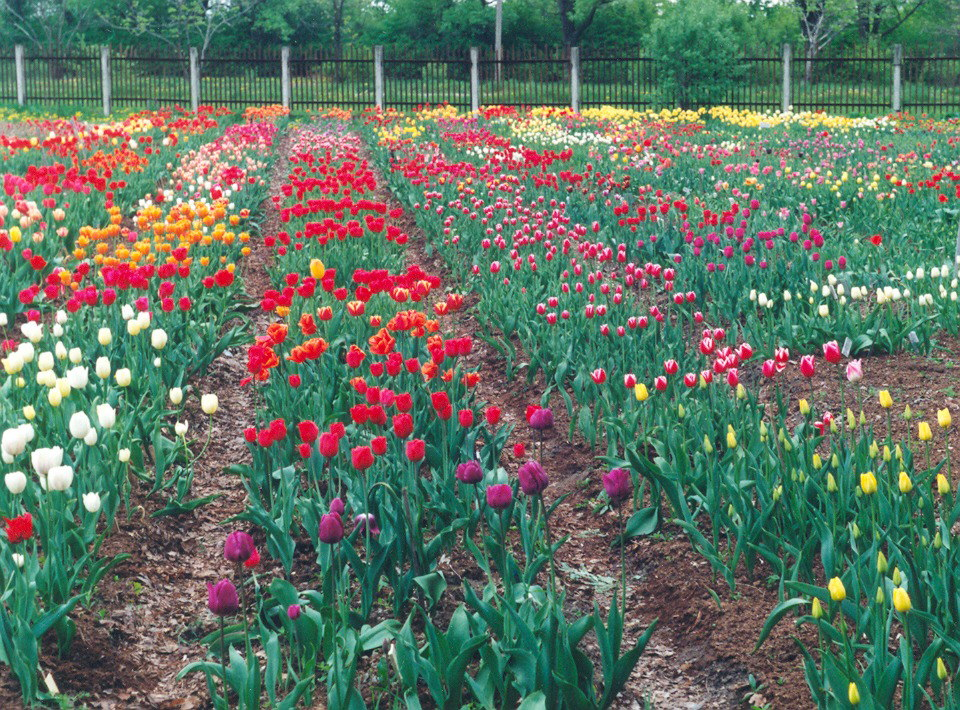 Tulpės (Tulipa sp.), Kauno botanikos sodas.